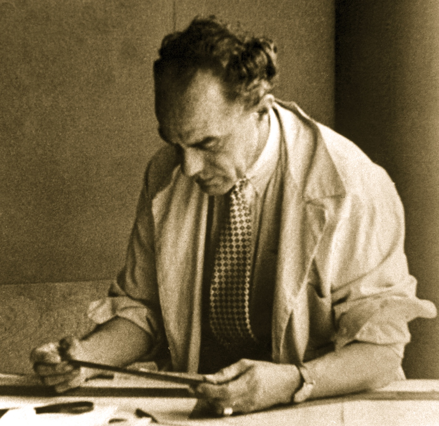 Ilustre arquitecto mexicano precursor de la arquitectura moderna en México. Sus principales obras son proyectos auspiciados por la Fundación Mier y Pesado, e incluyen, entre otros: el Edificio Ermita (Av. Revolución y Av. Jalisco; 1931), el Asilo de Ancianos de Orizaba (1936-40), Edificio de la Fundación Mier y Pesado (5 de Mayo y Bolivar; 1933), y la Universidad de Guanajuato en colaboración con Vicente Urquiaga (1948). Juan Segura fue prolífico y longevo, diseño y construyó un sin numero de casas habitación y edificios de departamentos en las colonias Roma, Hipódromo Condesa, Santa María la Rivera, y Narvarte, entre otras.